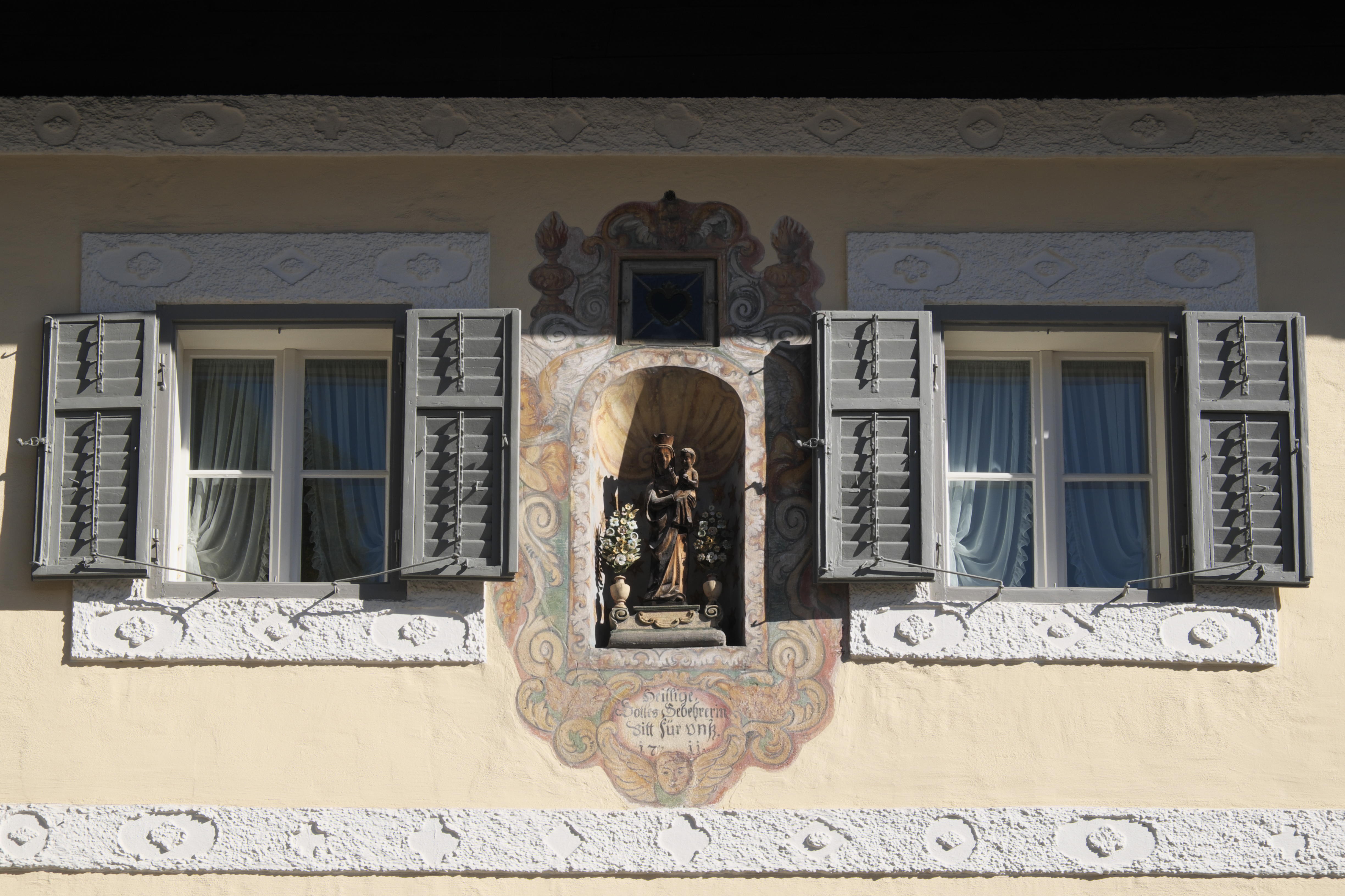 Ehemalige Pfister-Mühle, Bräuhausstraße 14, in Berchtesgaden im Landkreis Berchtesgadener Land (Bayern/Deutschland), Figurennische mit Madonnenfigur